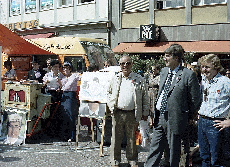 OB-Kandiat Dr. Rolf Böhme auf einer Wahlkundgebung am Bertoldsbrunnen in Freiburg i. Br.